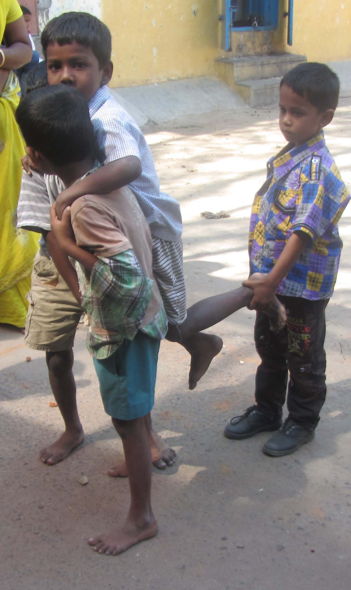 கால் தூக்கிற கணக்கப்பிள்ளை என்னும் தமிழக நாட்டுப்புற விளையாட்டு. own shot.